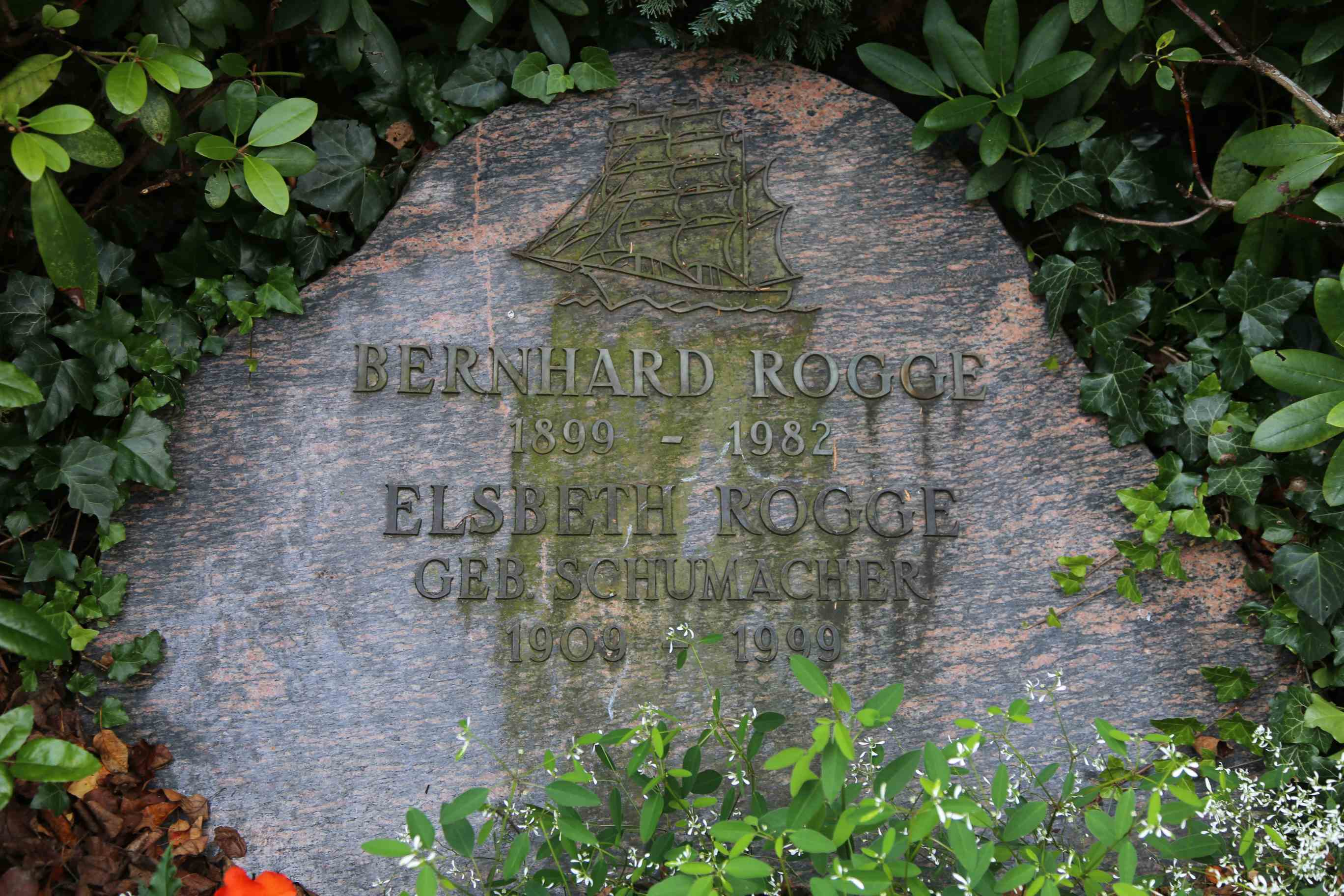 Bernhard Rogge (* 4. November 1899 in Schleswig; † 29. Juni 1982 in Reinbek) war ein deutscher Marineoffizier, zuletzt Konteradmiral der Bundesmarine.